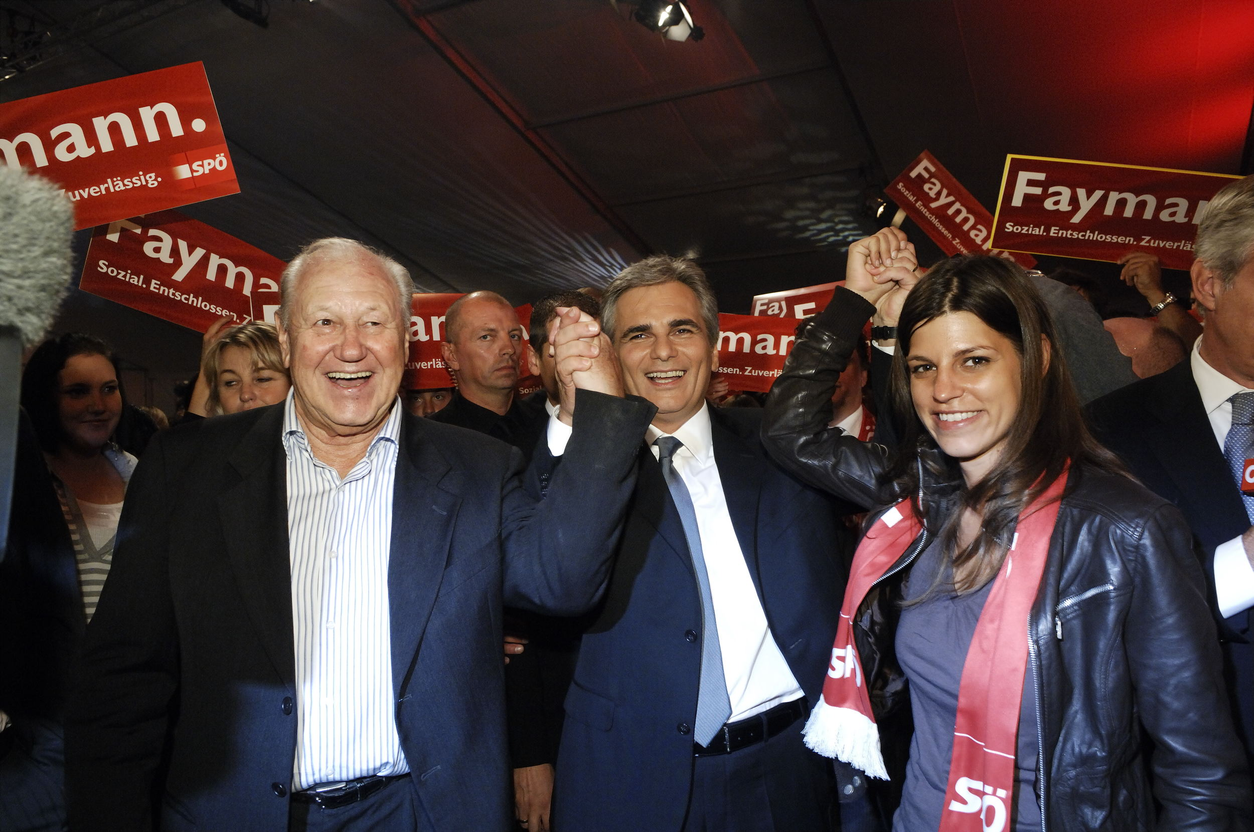 SPÖ Zelt vor der Parteizentrale am Tag der Natinalratwahl 2008. Wien, 28.09.2008, © Thomas Jantzen / SPÖ